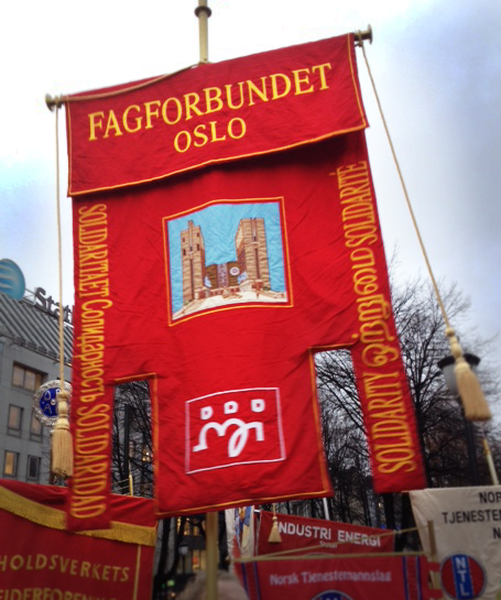 fagforeningsfane fra Fagforbundet Oslo fane i demonstrasjon foran Stortinget i 2015